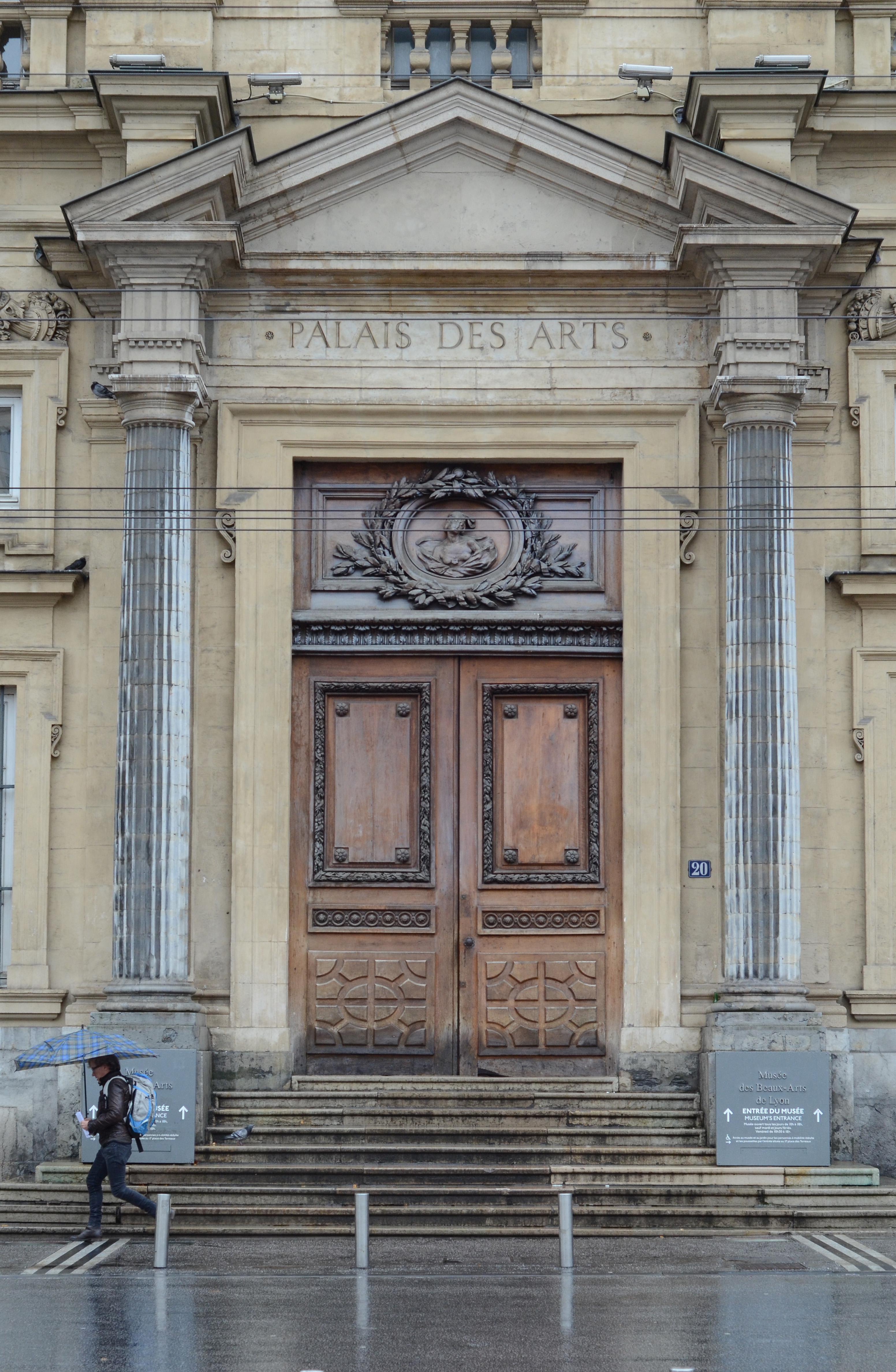 Réplique Buste de femme en médaillon, vue 2, entrée du musée, place des Terreaux